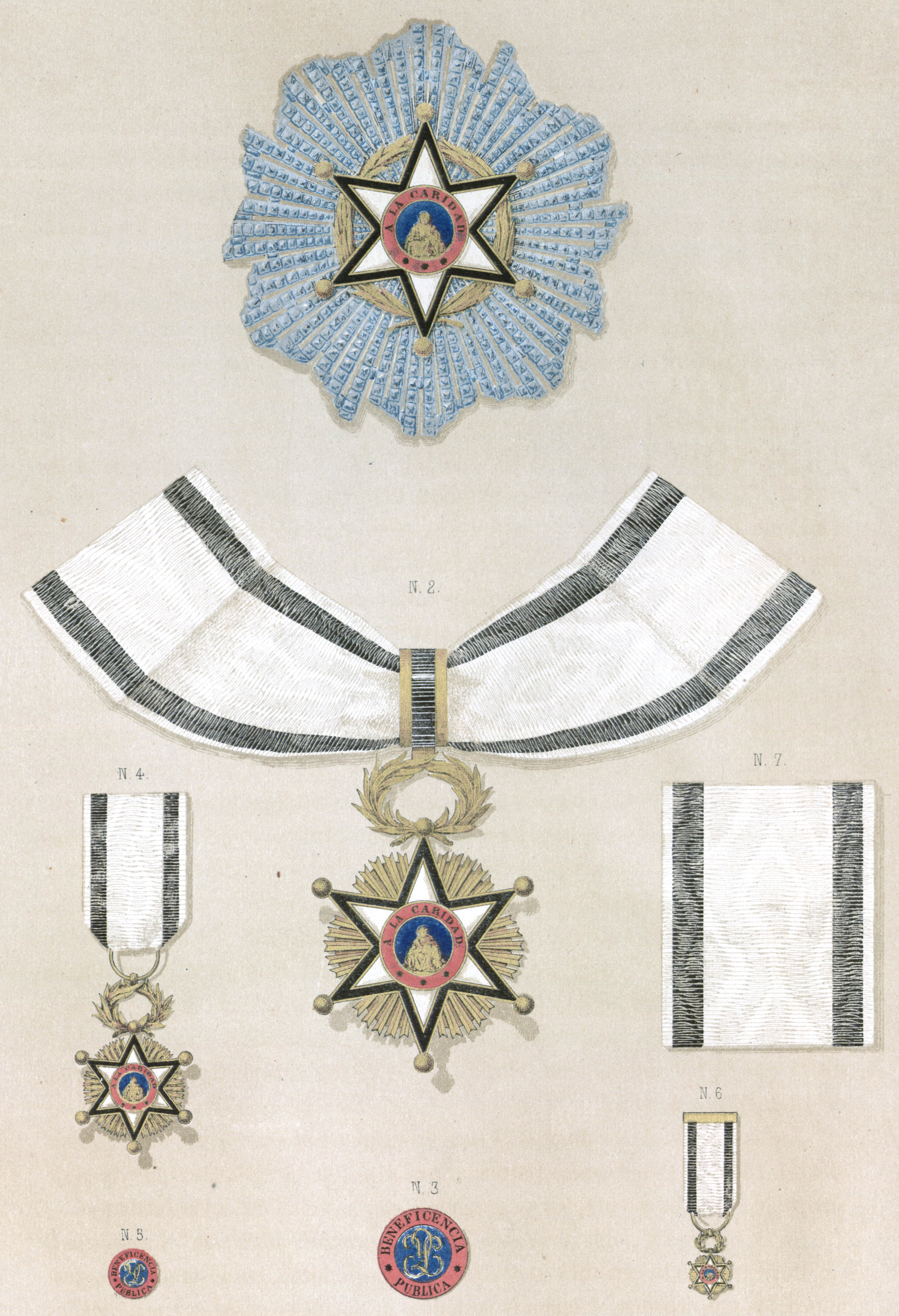 Orden de la Beneficencia